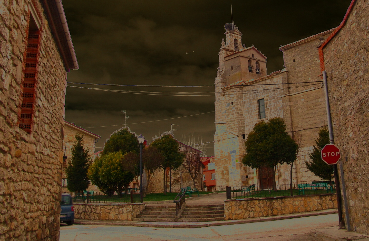 Quintanadueñas, Alfoz de Quintanadueñas, Castilla la Vieja, España